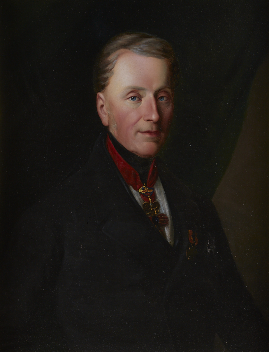 František Antonín II. hrabě Liebsteinský z Kolowrat (1778-1861)